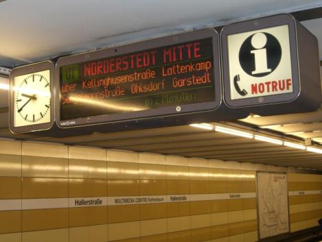 Treinaanwijzer